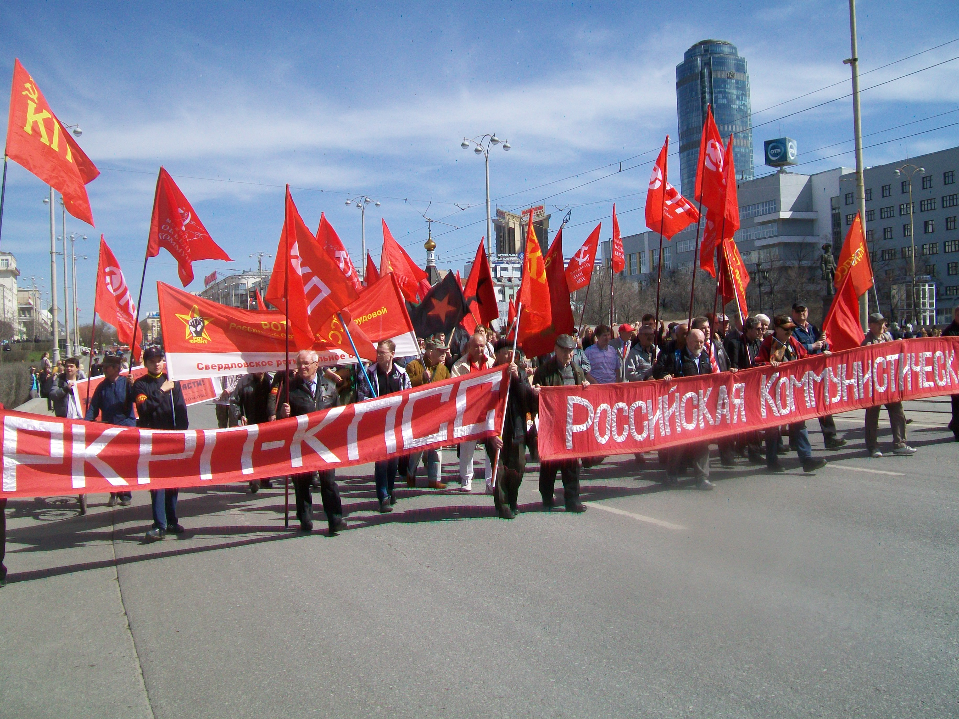 РКРП и другие не входящие в КПРФ коммунистические группы на первомае в Екатеринбурге, 1 мая 2017 года